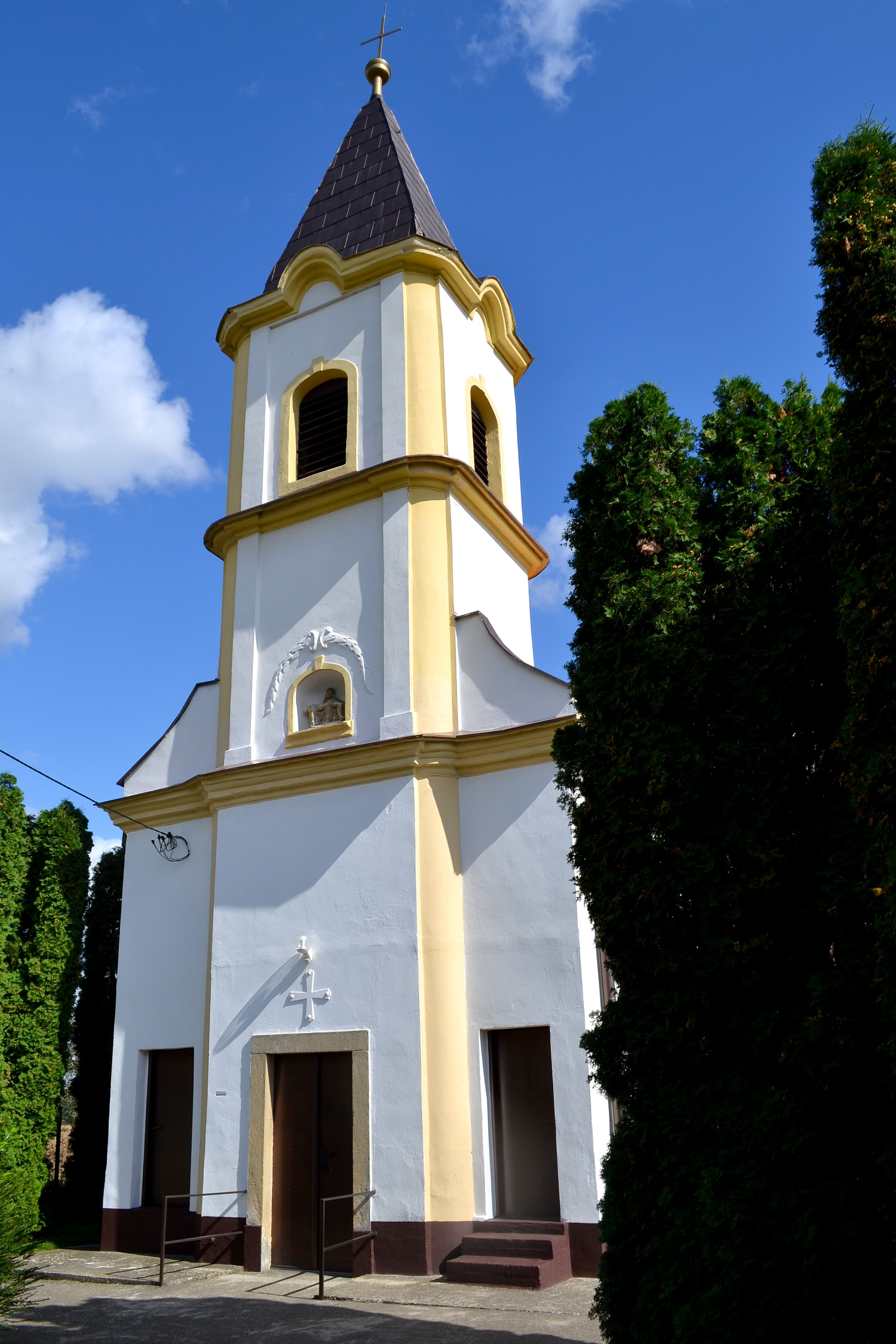 Dolné Trhovište (okr. Hlohovec), Kostol svätého Juraja; hlavné priečelie s vežou